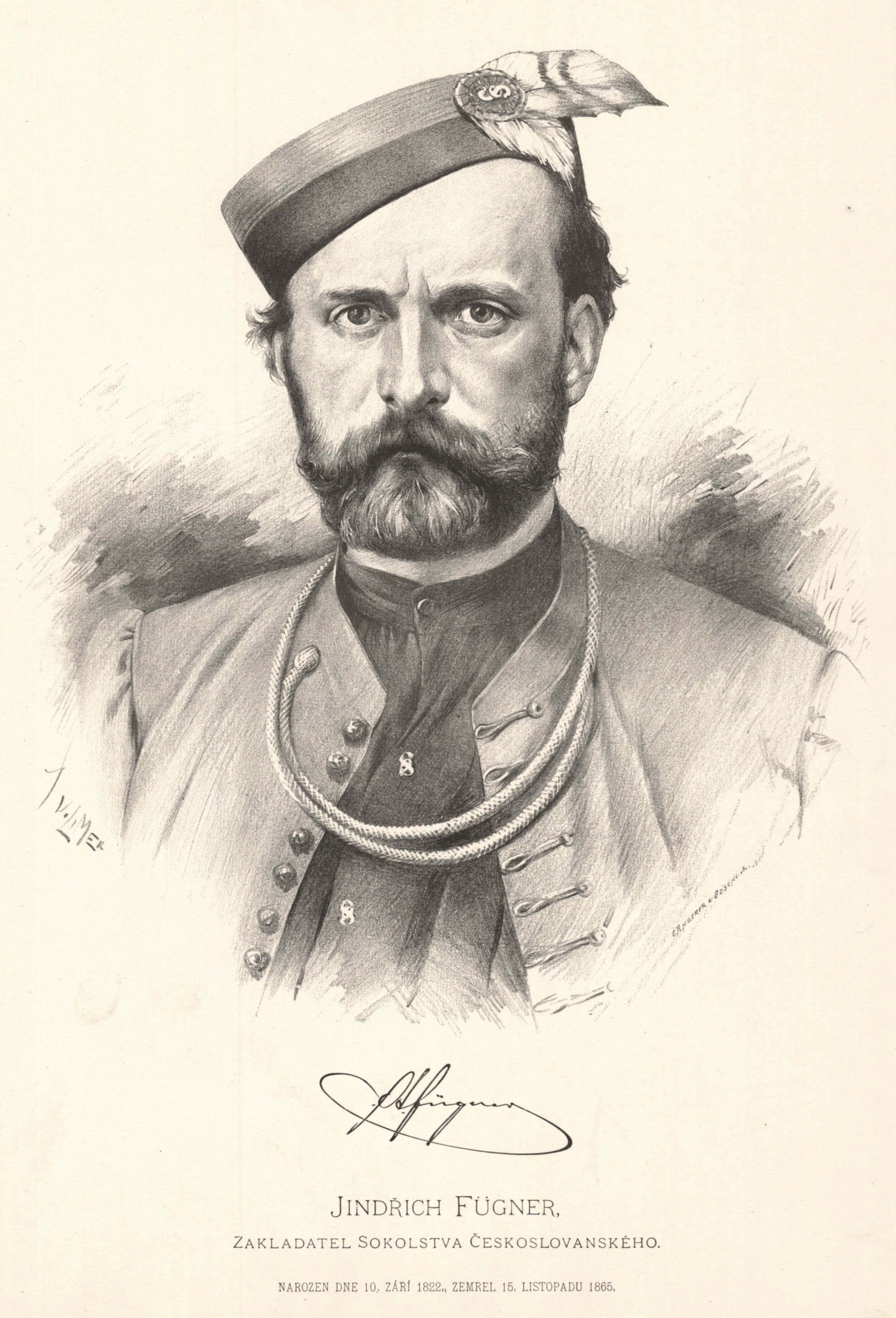 Portréty českých osobností od Jana Vilímka